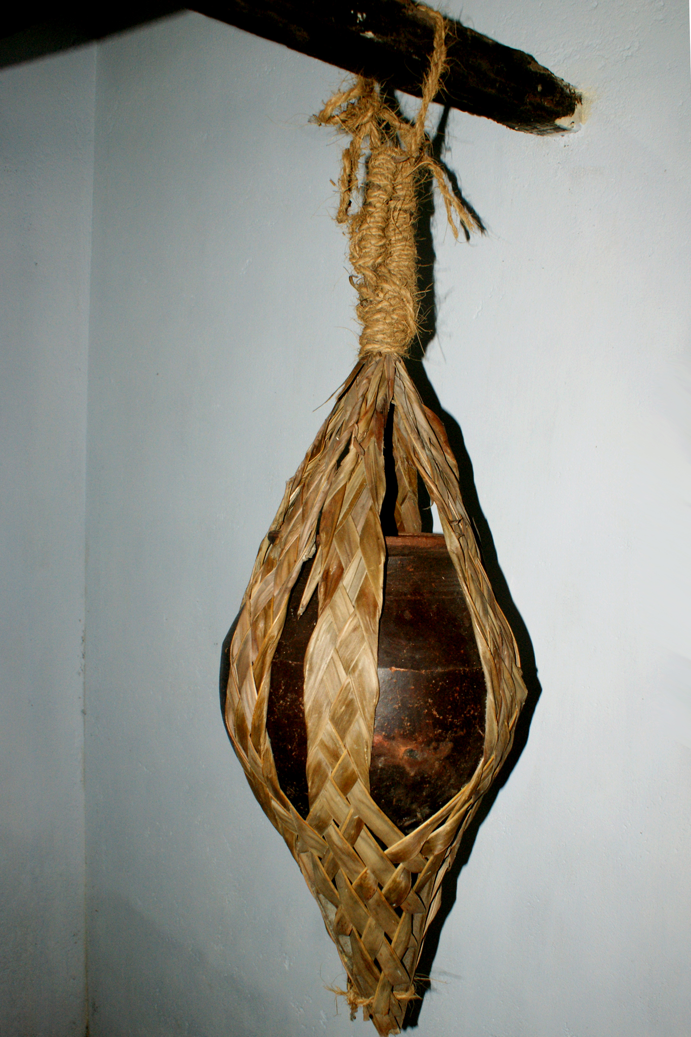 ഓല ഉറിയിൽ കലം.